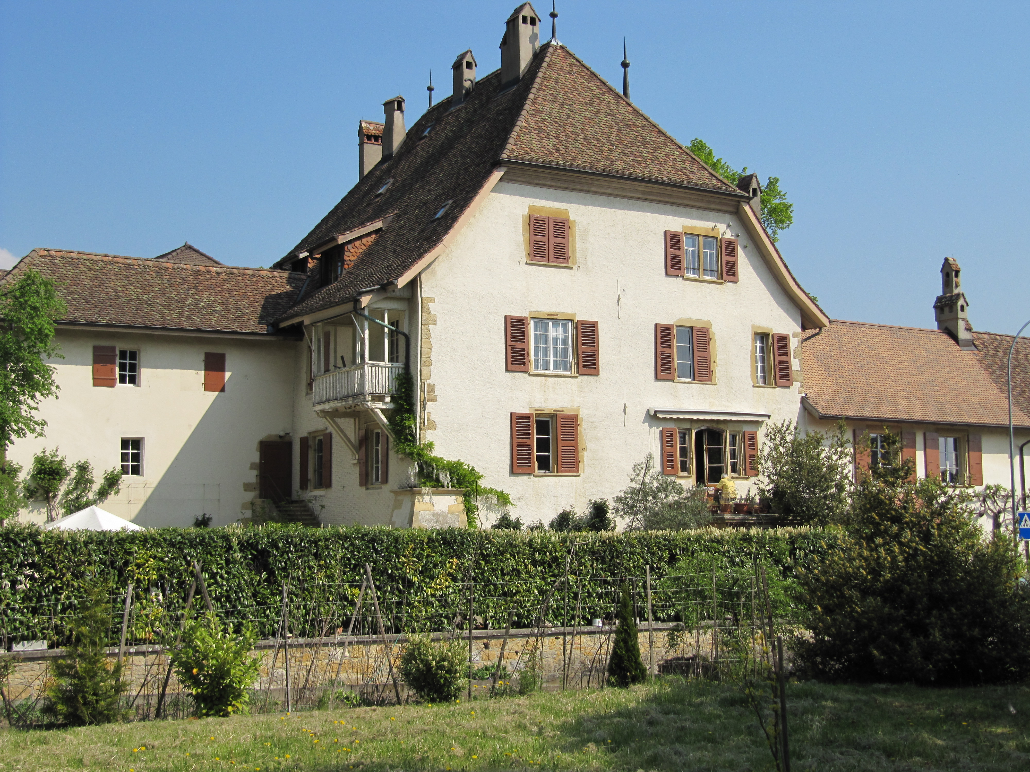 Manoir Le Pontet, Colombier, Suisse/Switzerland